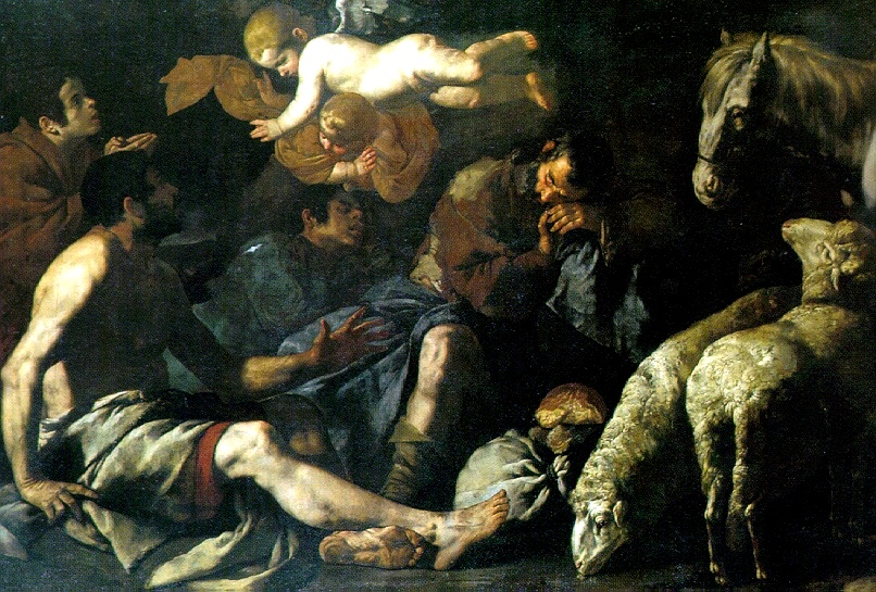 Il quadro dipinto è conosciuto da numerose altre repliche conservate in diversi musei, stilisticamente affini, che ha portato gli studiosi a chiamare l'artista col soprannome di "Maestro dell'Annuncio ai Pastori". Recentemente il Maestro è stato identificato con Bartolomeo Bassante o con Juan Dò. Acquisizione post-unitaria.